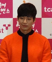 E채널 드라마 '실업급여 로맨스' 제작발표회